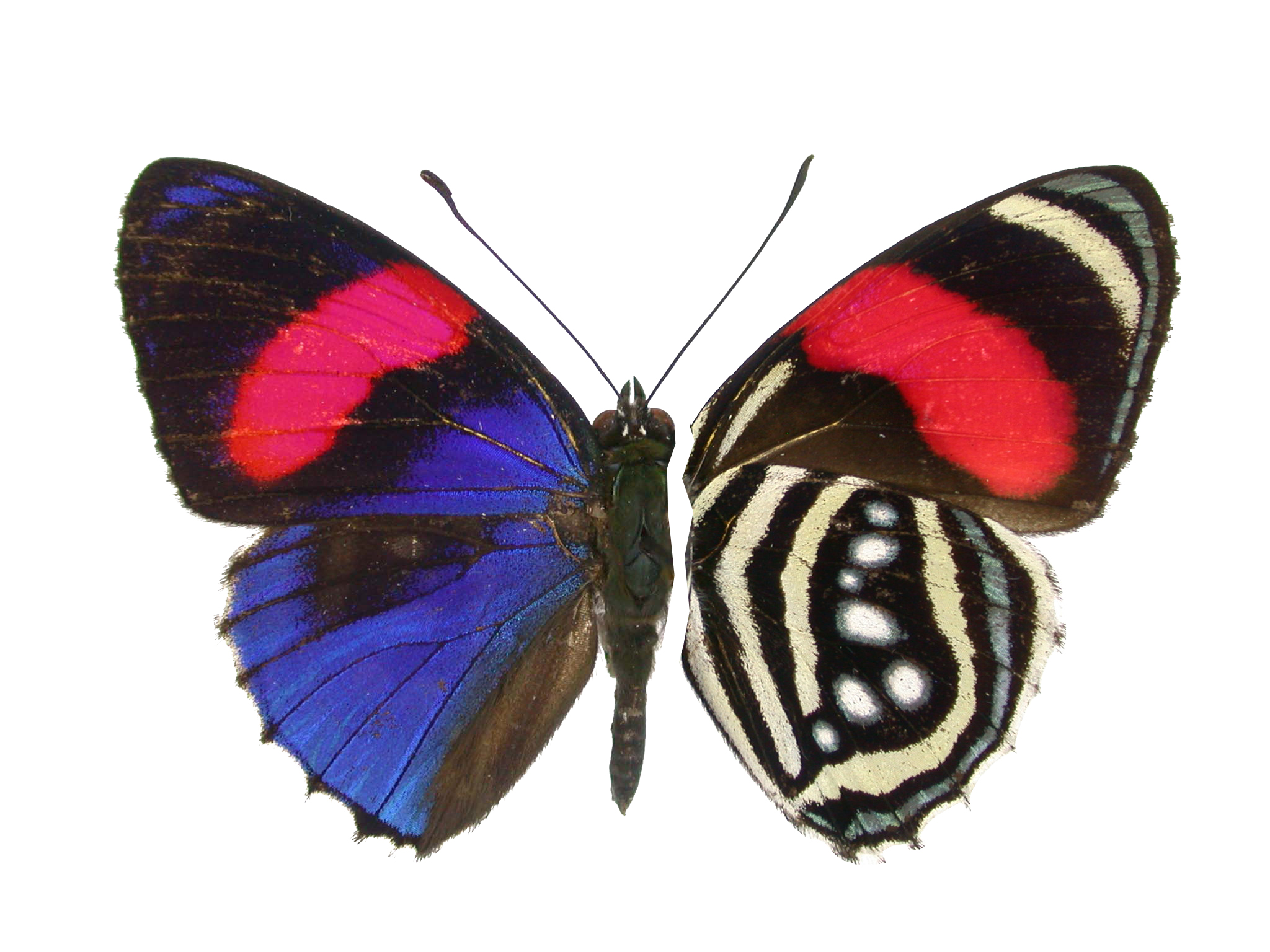 Callicore hesperis specimen from Ecuadorian Amazonia